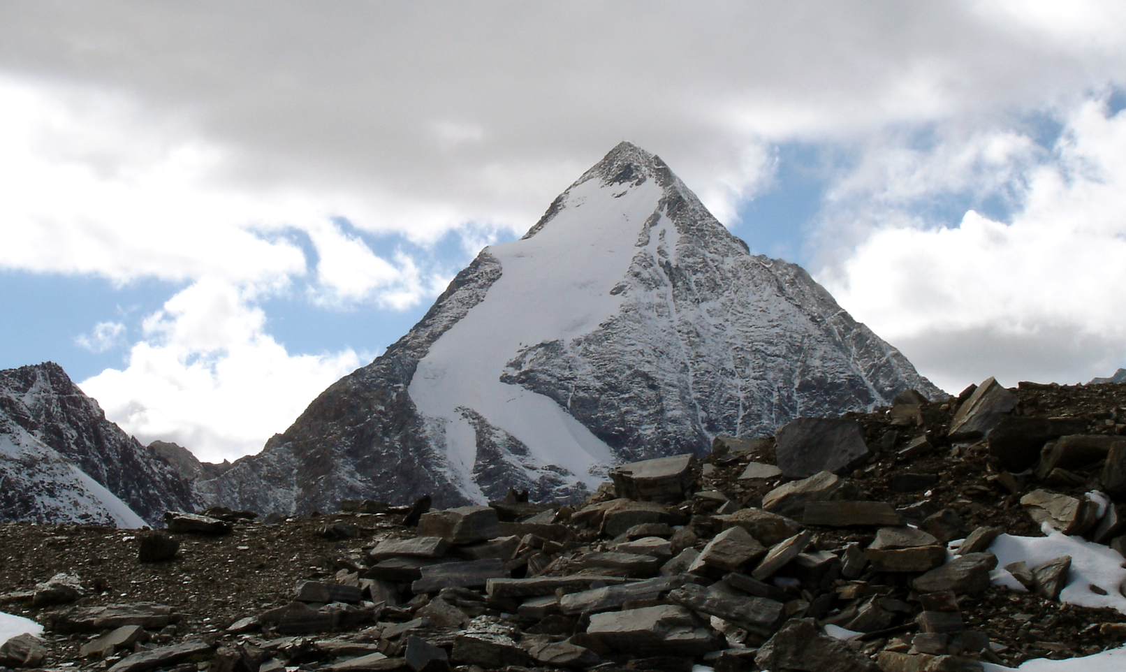 Königspitze (3857 m)